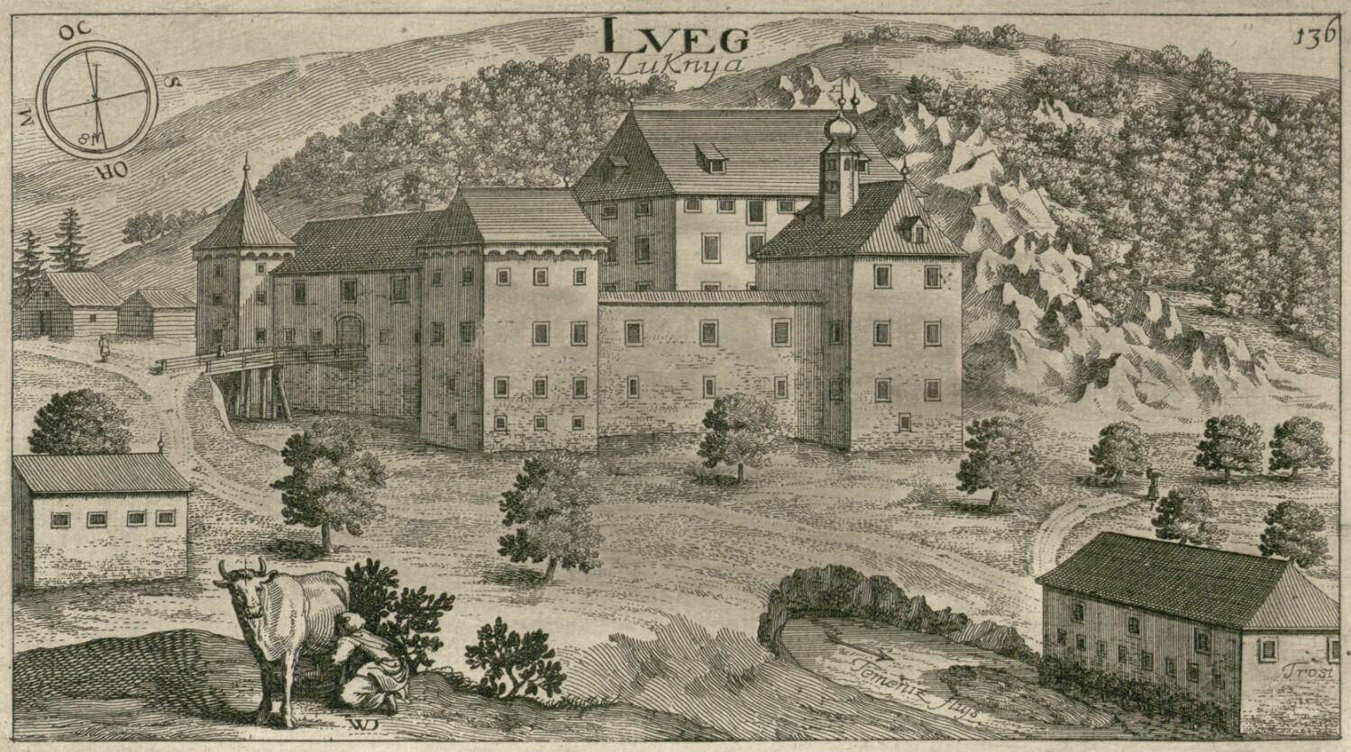 Grad Luknja